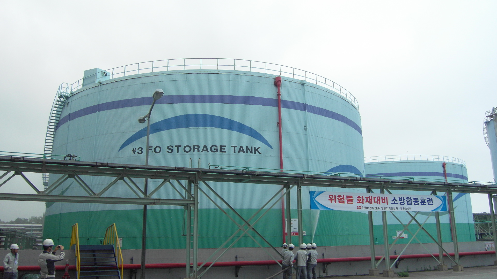 Photos of Gangwon-do Fire and Rescue Service